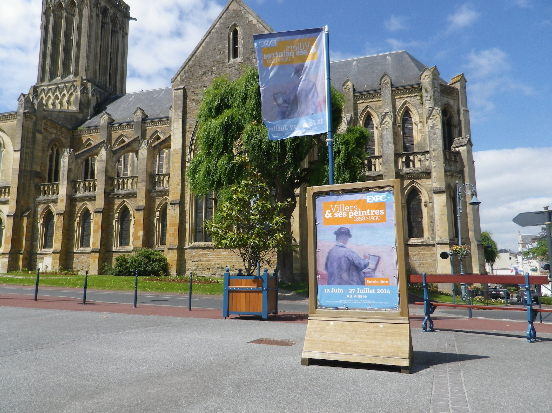 drapeau (Julien Turbiau peint par Marie-Renée Ucciani), devant l'église de Villers-sur-Mer, 12 juin 2014